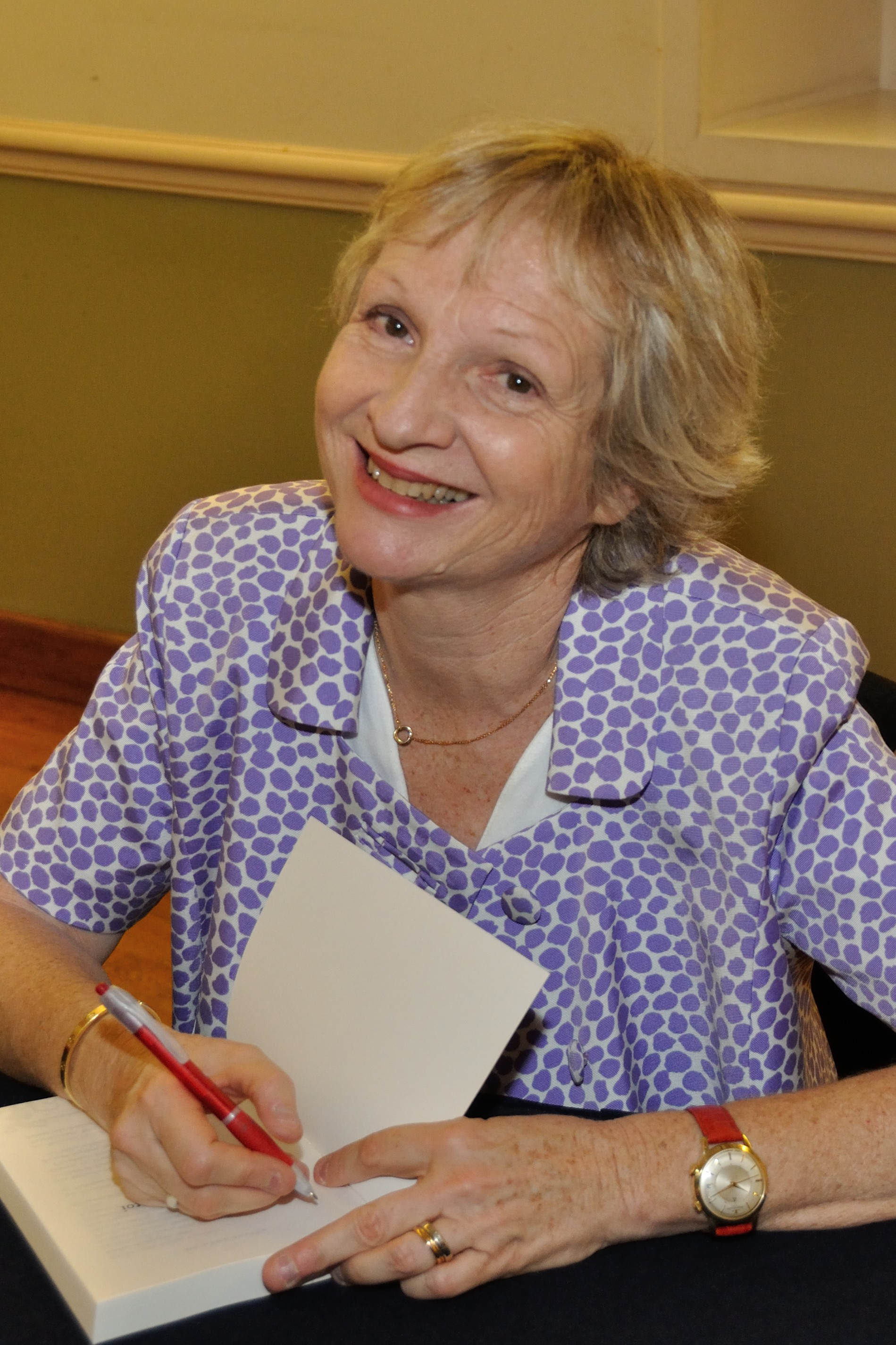 portrait